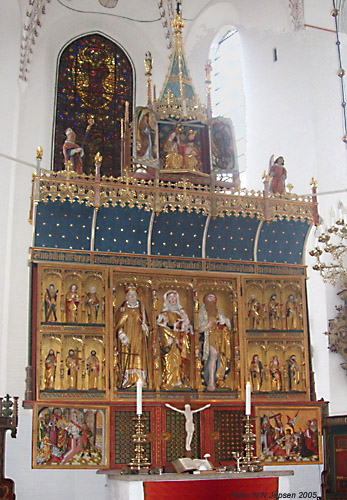 Bernt Notkes altertavle i Århus Domkirke, Denmark (Festsiden)